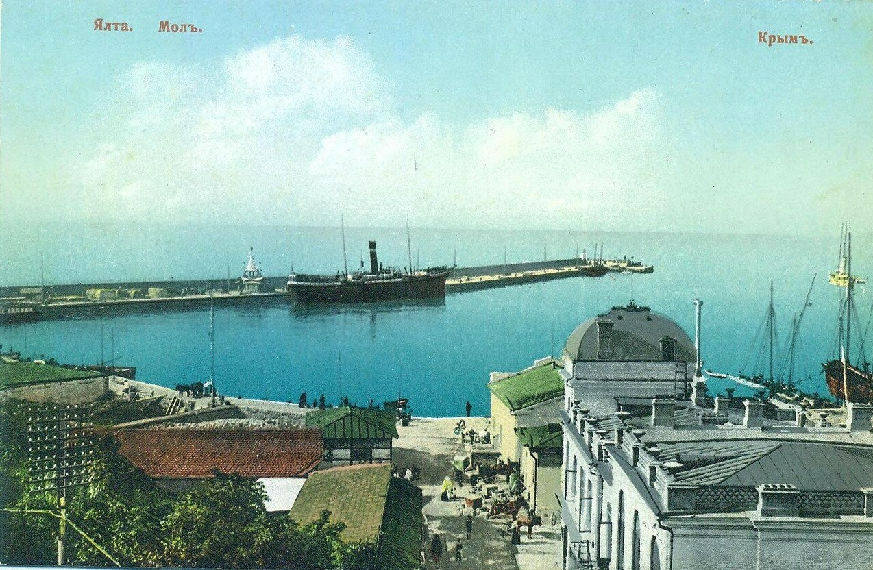 Ялтинский мол сразу после постройки